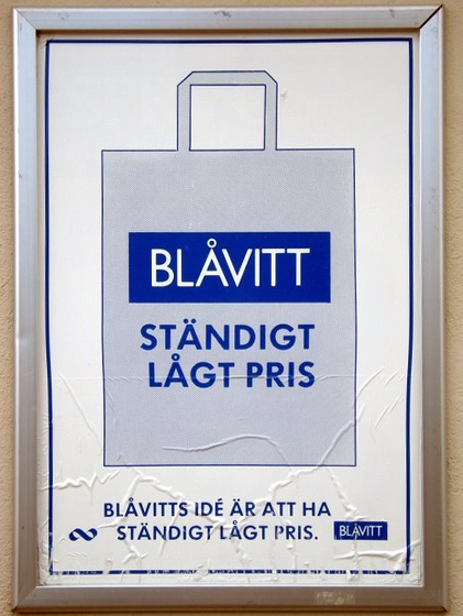 Konsums varumärke "Blåvitt". Från Coop Nära i Enviken 2008.